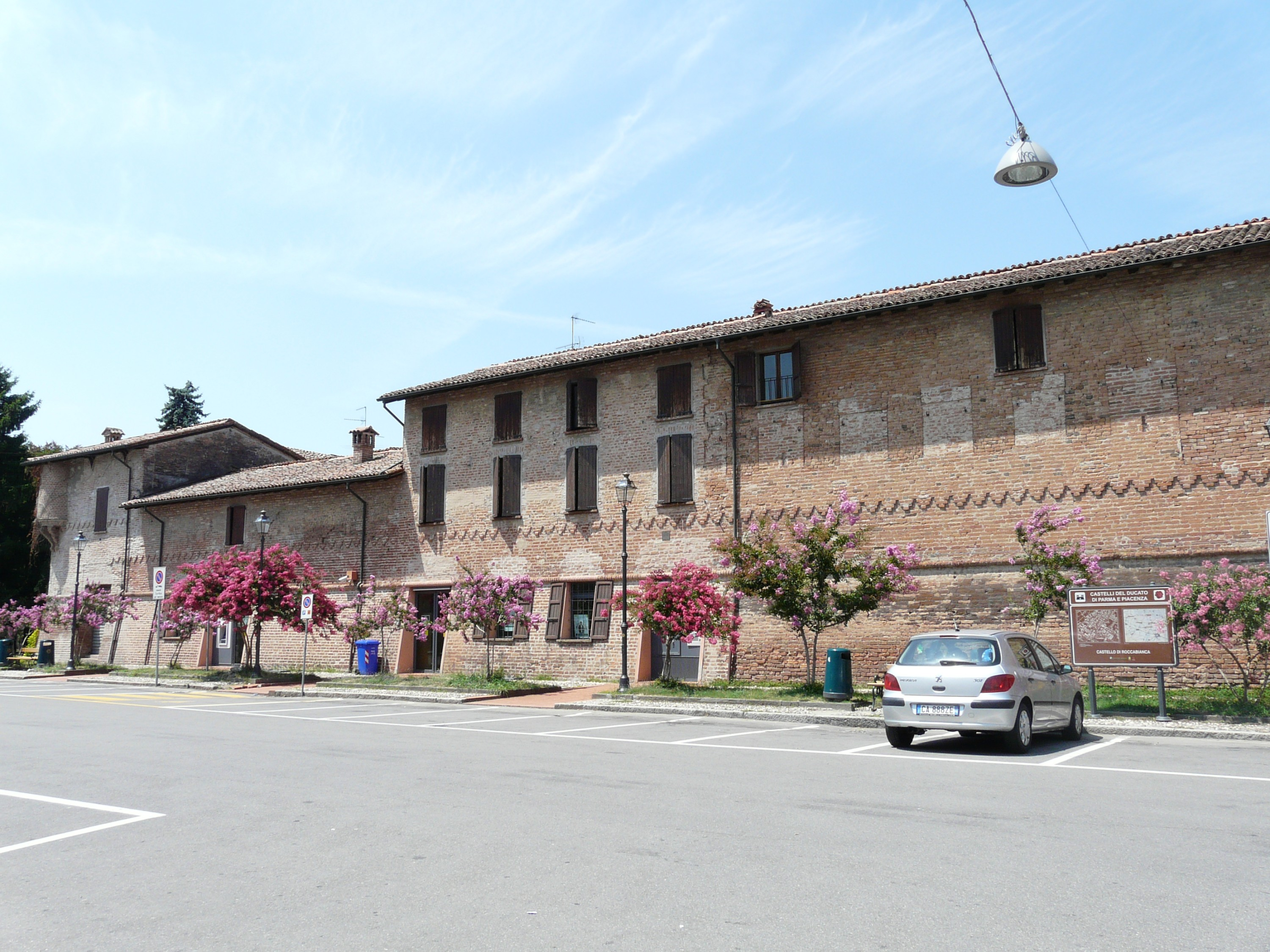 Castello di Roccabianca, Emilia-Romagna, Italia